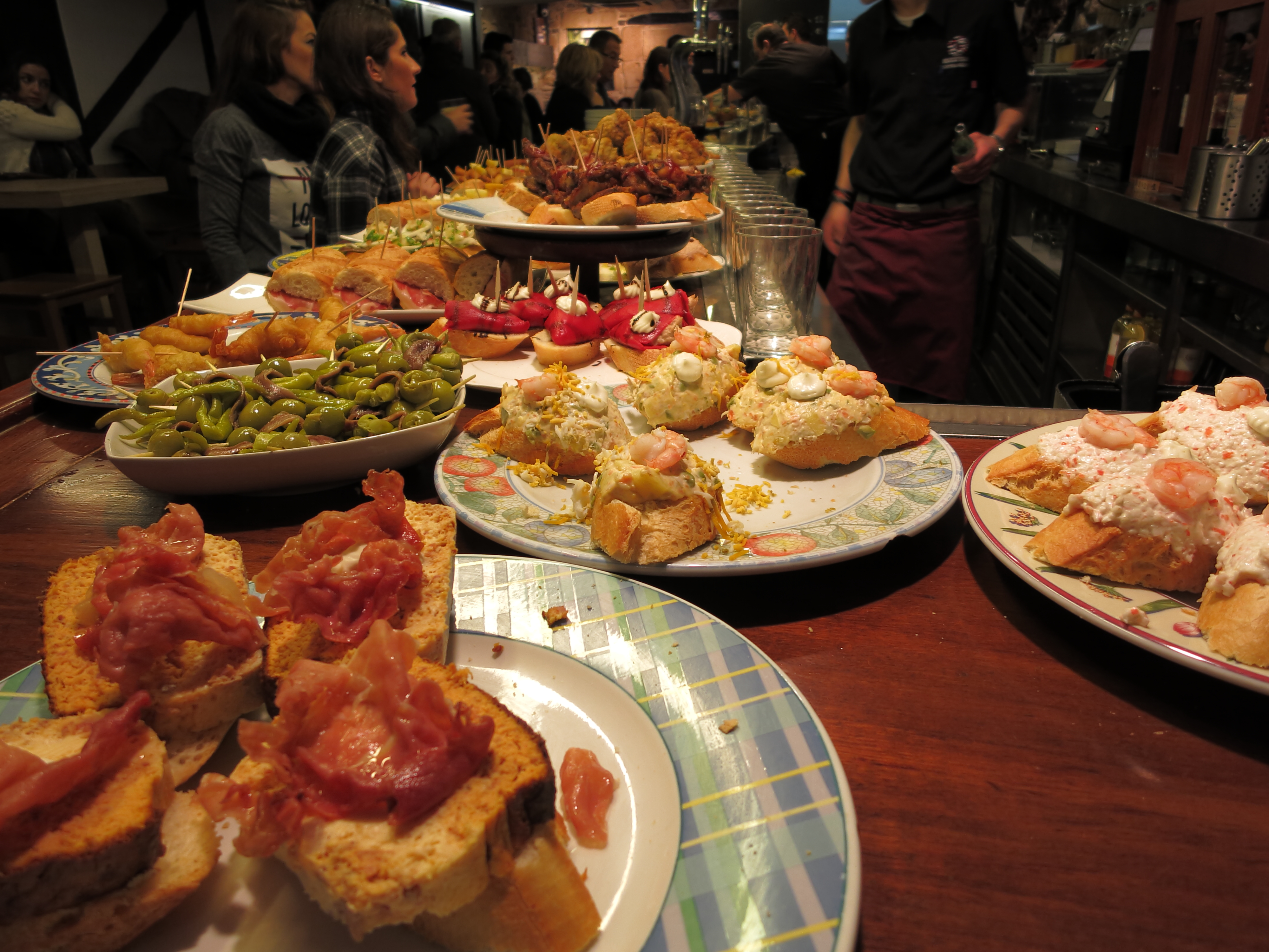 Barra de pinchos en un bar de Donostia-San Sebastián, País Vasco, España